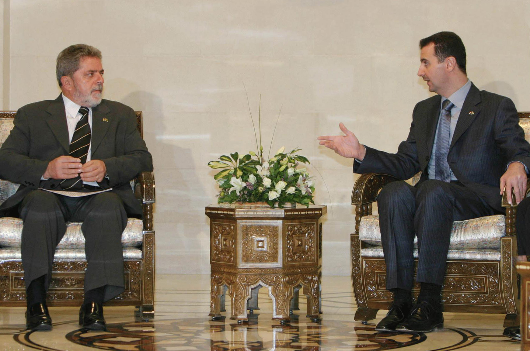 Lula da Silva and Bashar al-Assad meeting in Damascus.